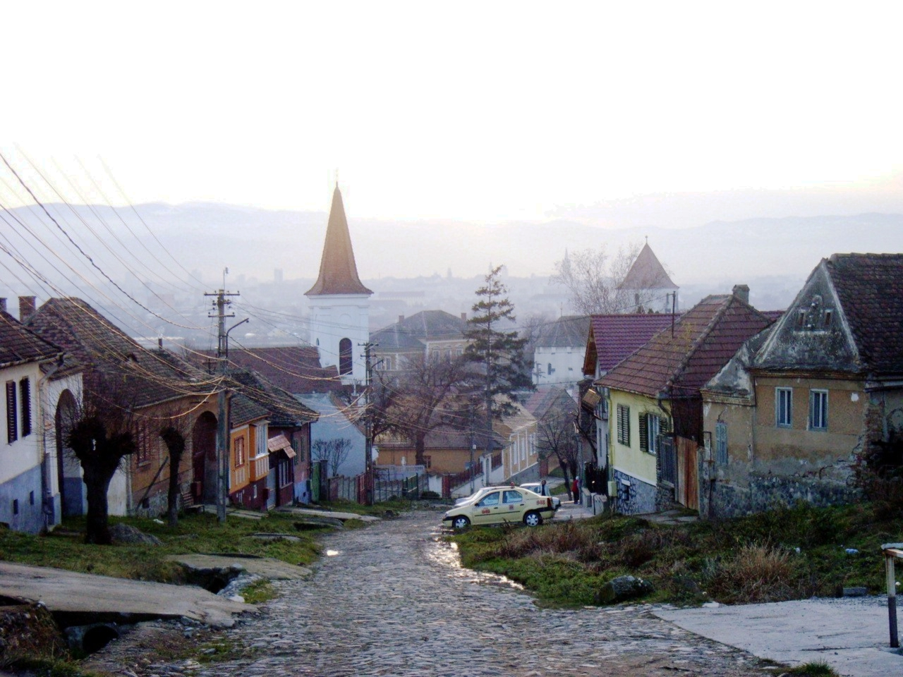 Hammersdorf, Blick auf die beiden Kirchen, im Hintergrund Hermannstadt